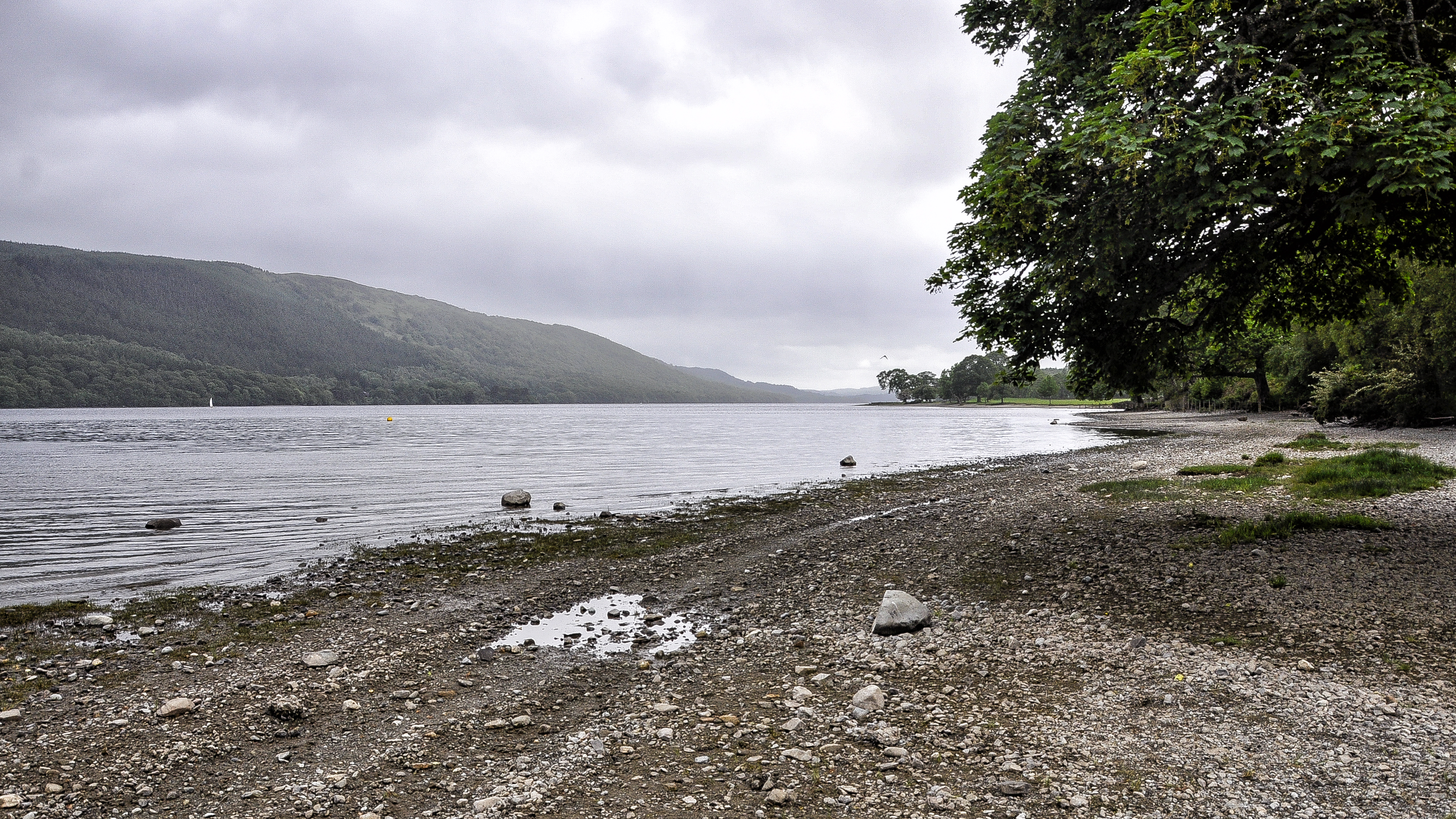 Coniston Water, Lake District, Engeland